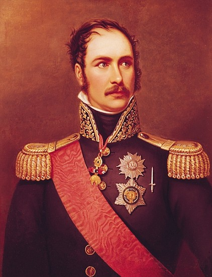 Portrait of Prince Eugene de Beauharnais